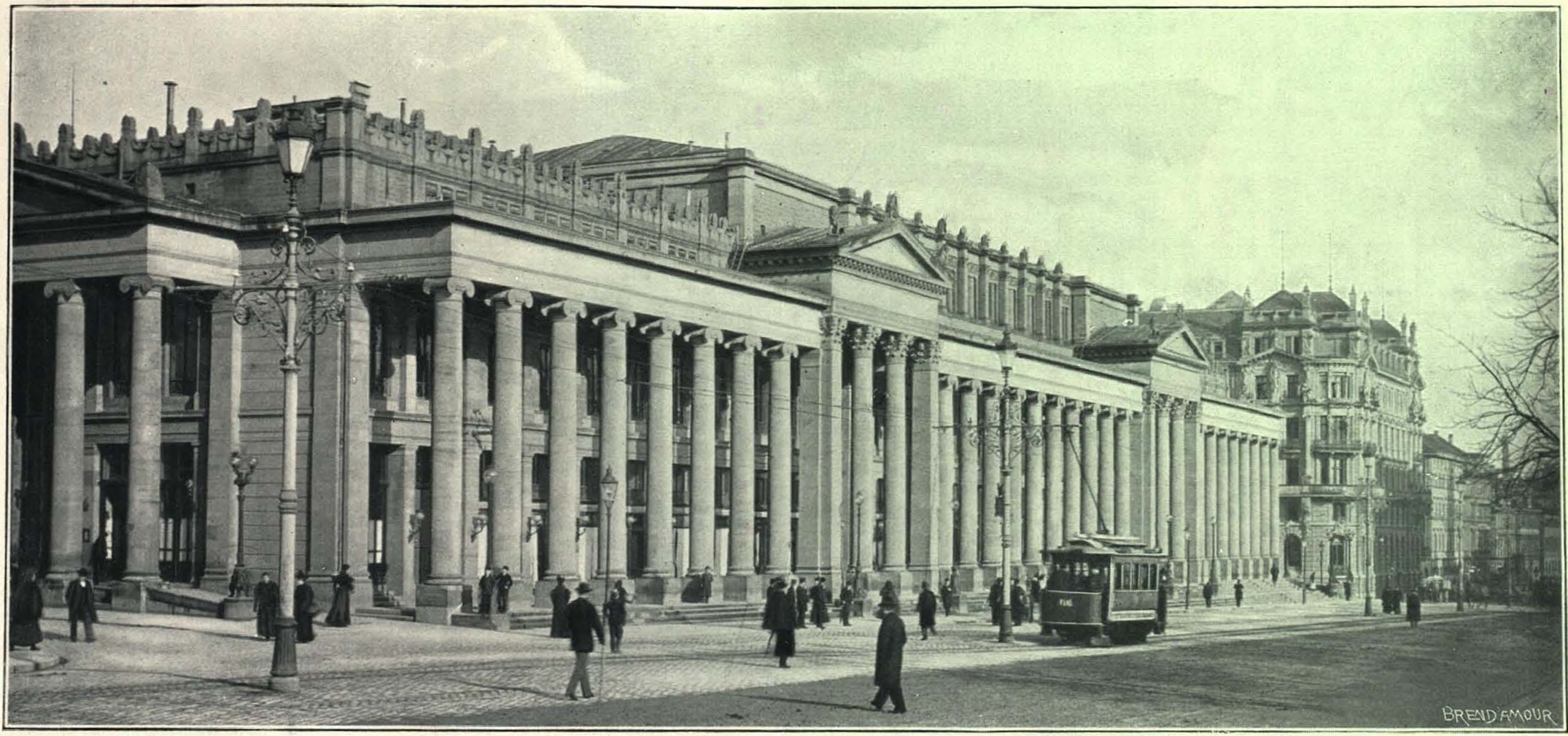 Stuttgart, Königsbau, Foto, 1905.